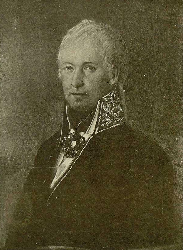 Иван Степанович Рижский